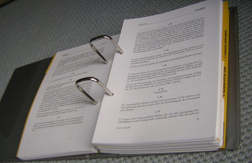 Die Verwaltungsgerichtsordnung, kurz VwGO, ist ein deutsches Bundesgesetz, welches das Gerichtsverfahren in der deutschen Verwaltungsgerichtsbarkeit (Verwaltungsprozessrecht) bundeseinheitlich regel.